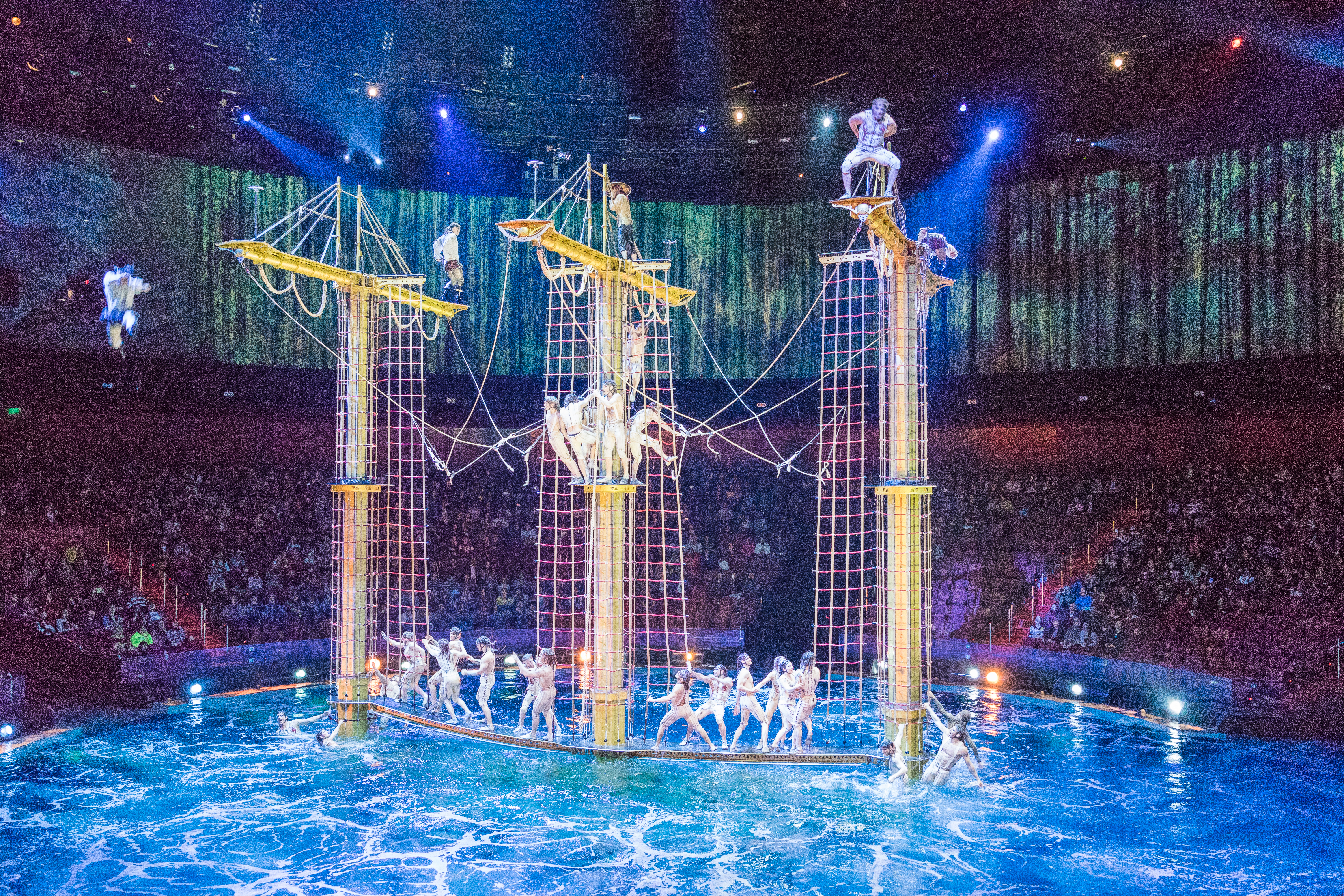 中文（台灣）: 水舞間開場由下方升起的大船。